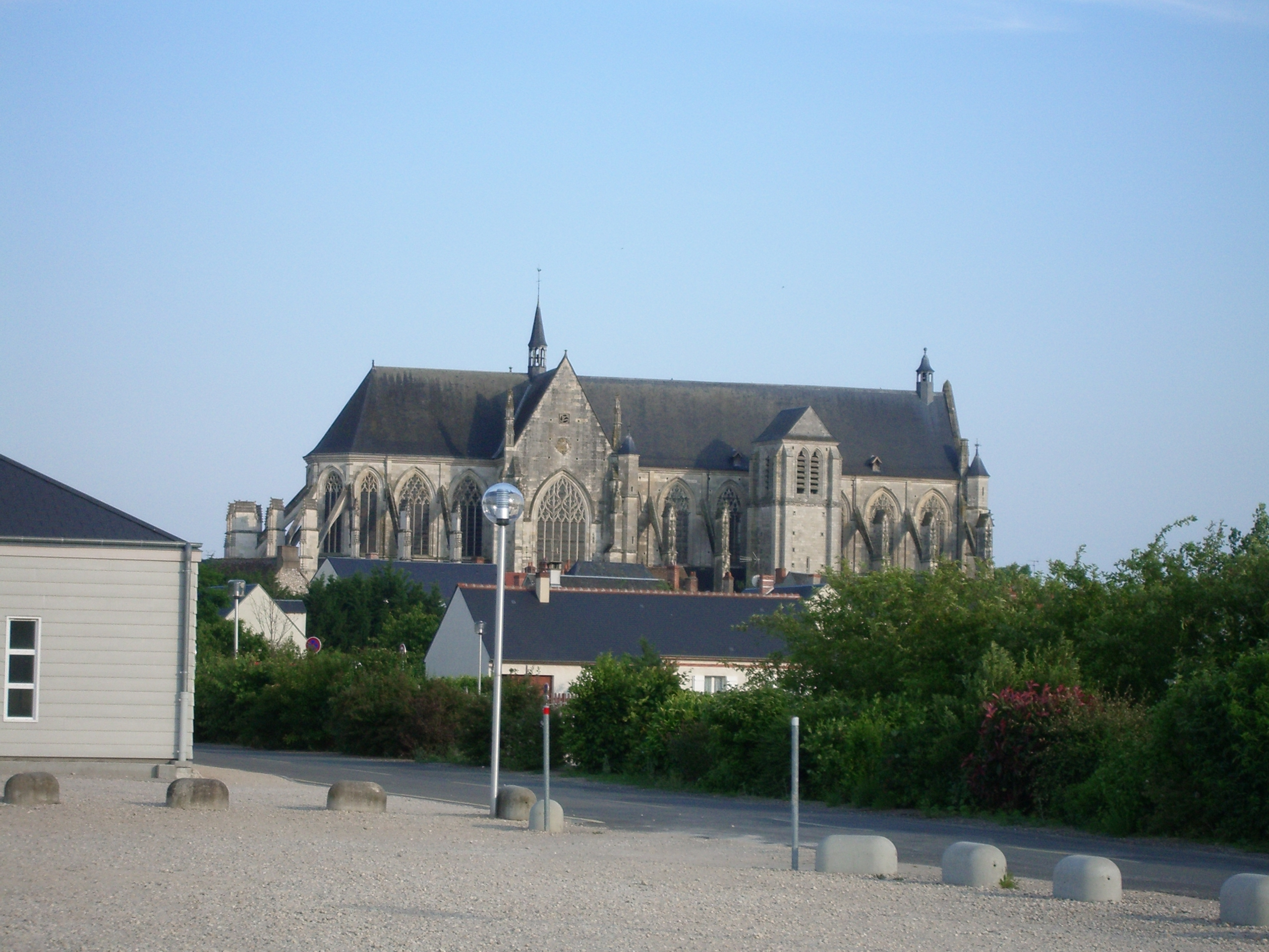 Basilique de Cléry-Saint-André, Loiret, France